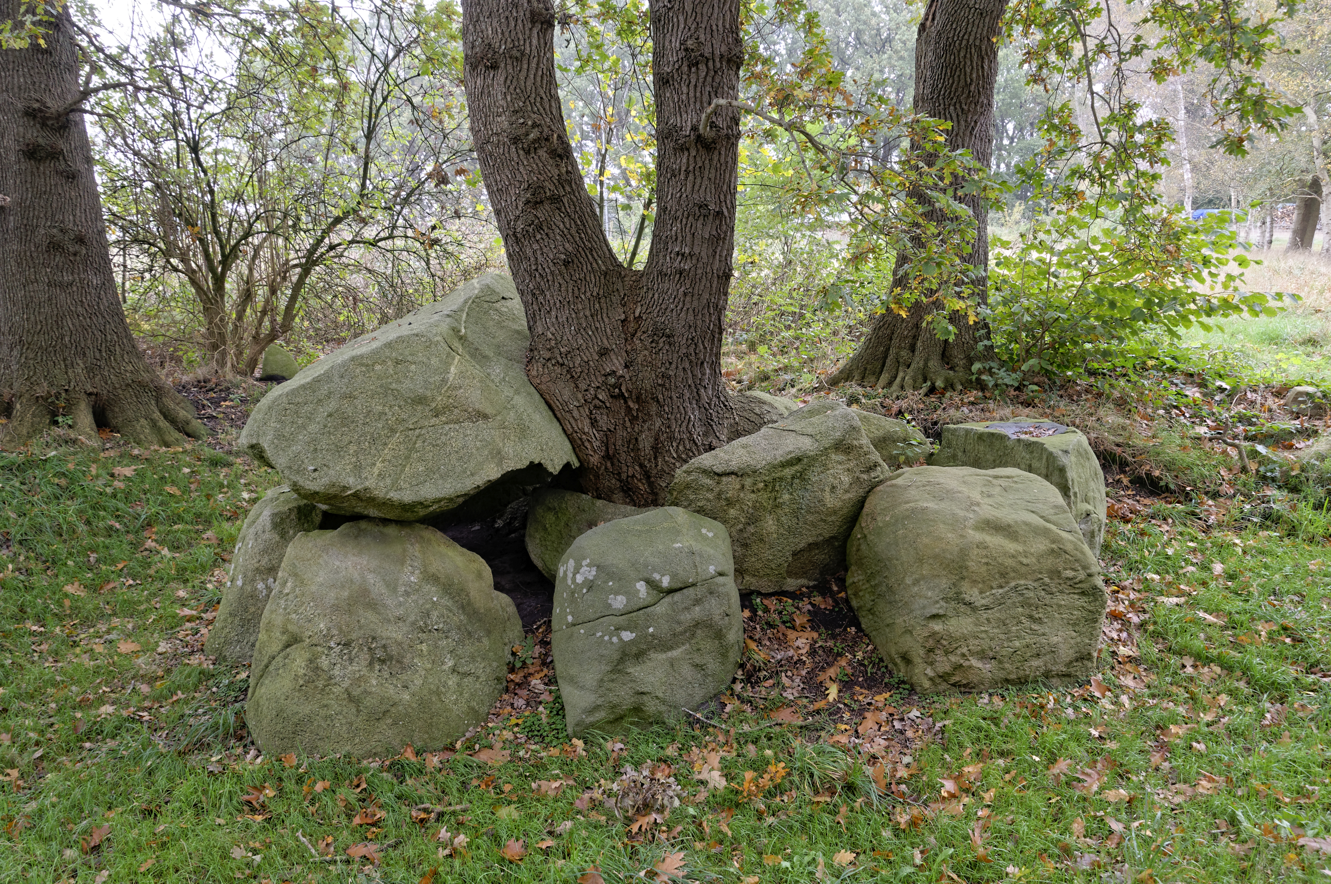 Ahlen-Falkenberg -Großsteingrab Karlskirche- 2019